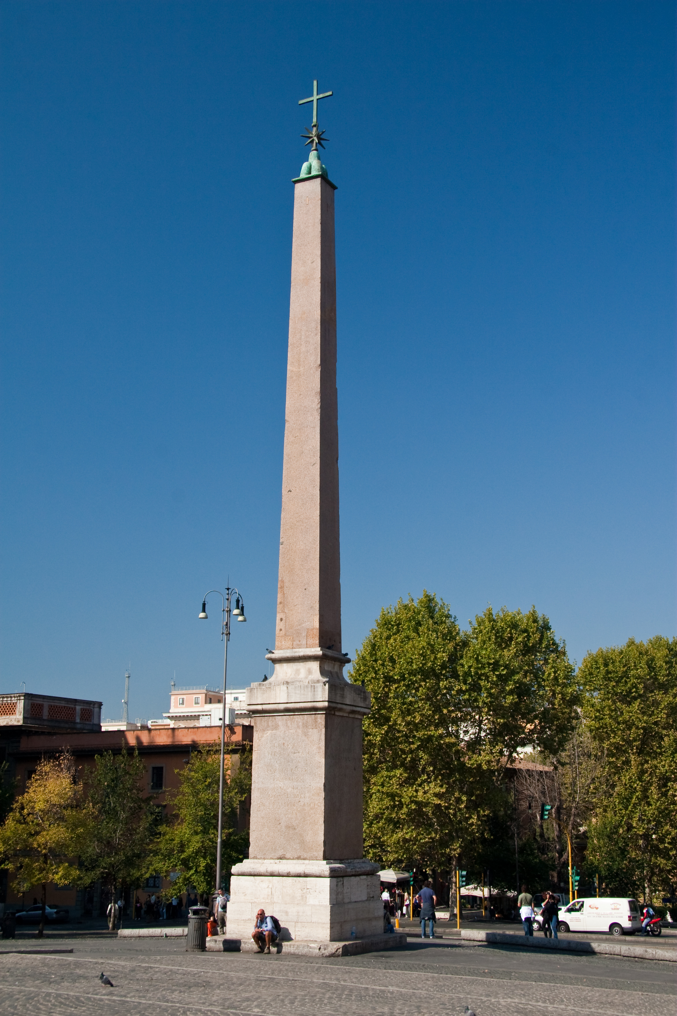 Obelisk Esquilino, near Basilica di Santa Maria Maggiore 41°53′53.4″N 12°29′51″E / 41.898167°N 12.4975°E